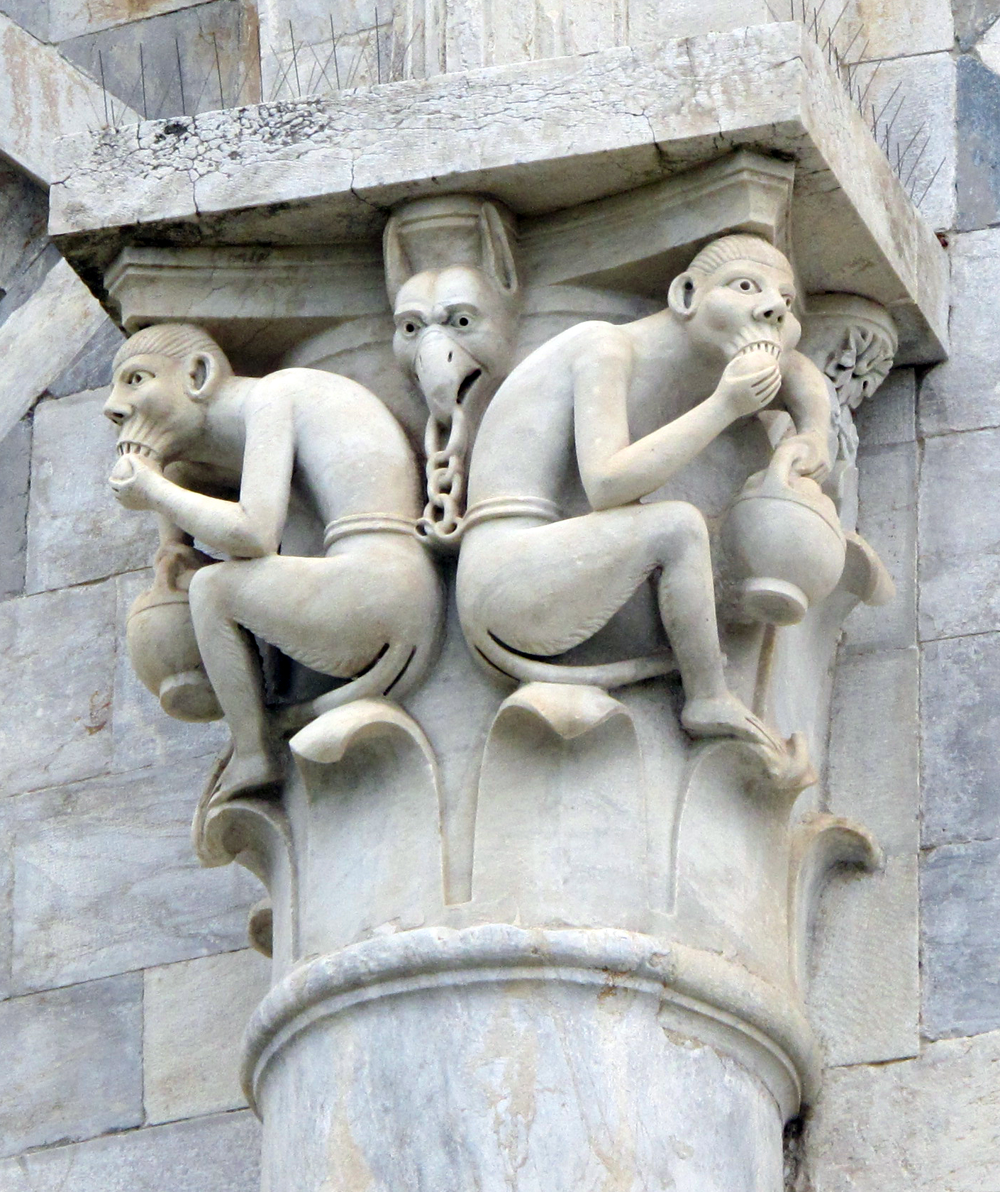 Pisa, Toscana